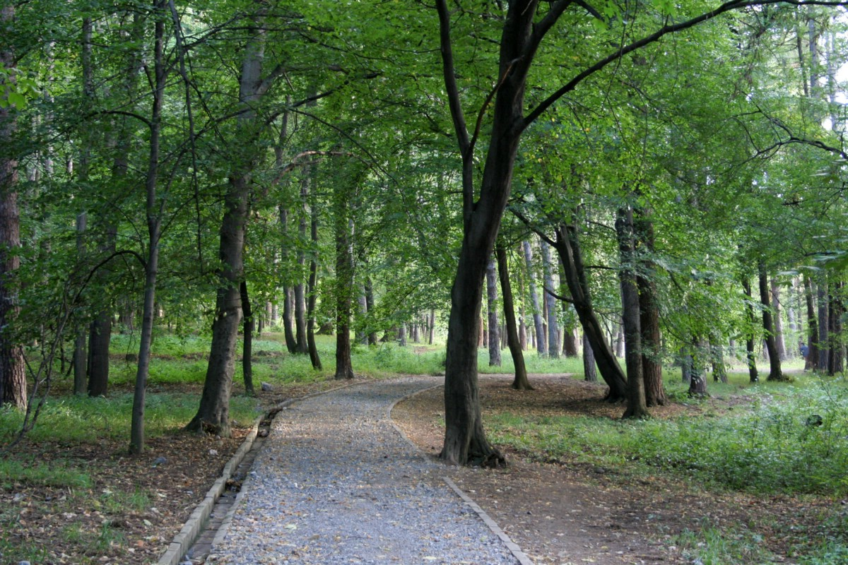 Държавен парк "Княжевска борова гора"